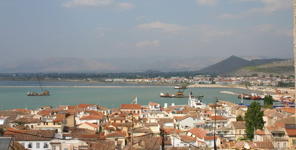 Nauplie (Grèce) - le port